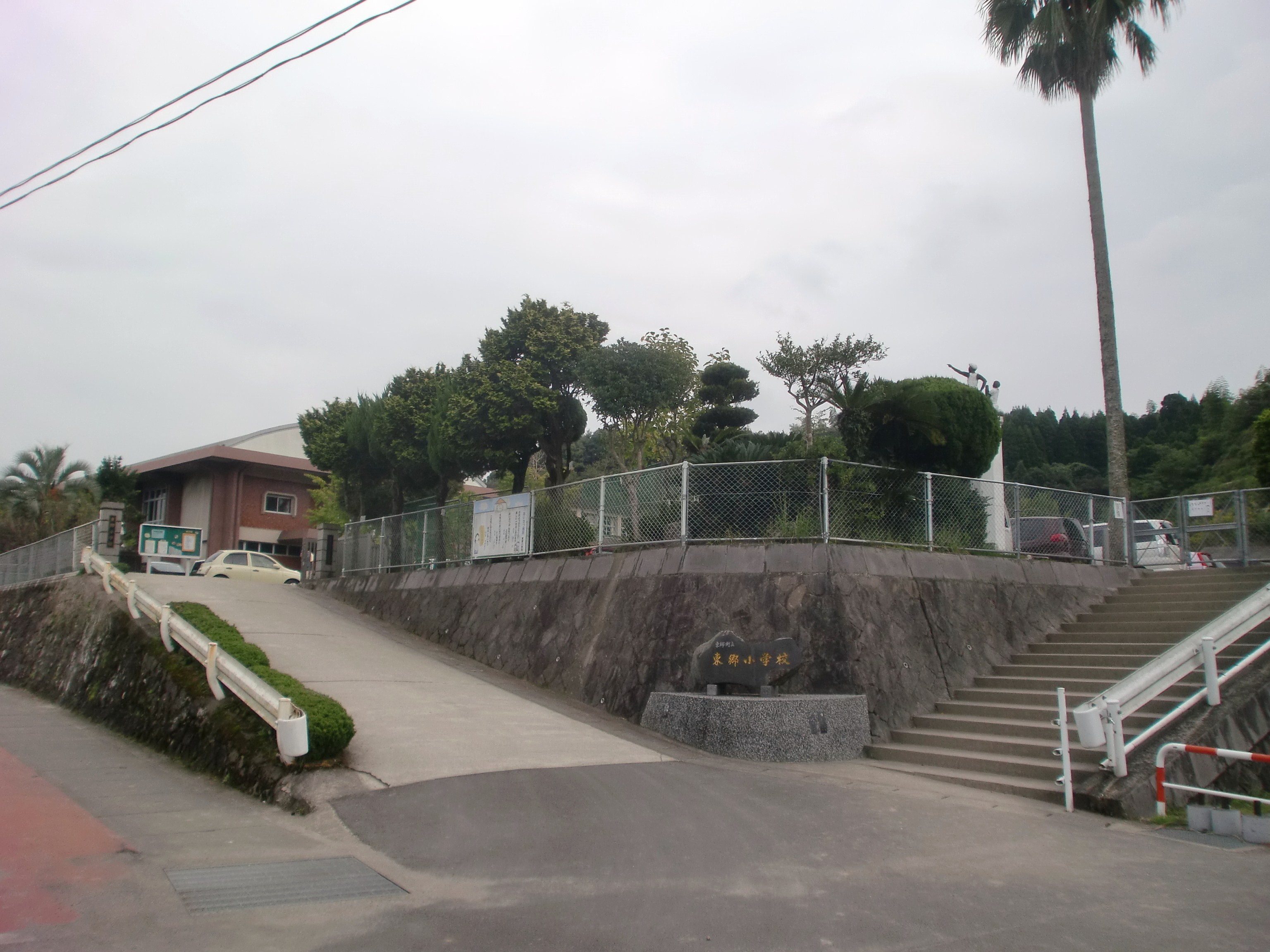 薩摩川内市立東郷小学校の外観